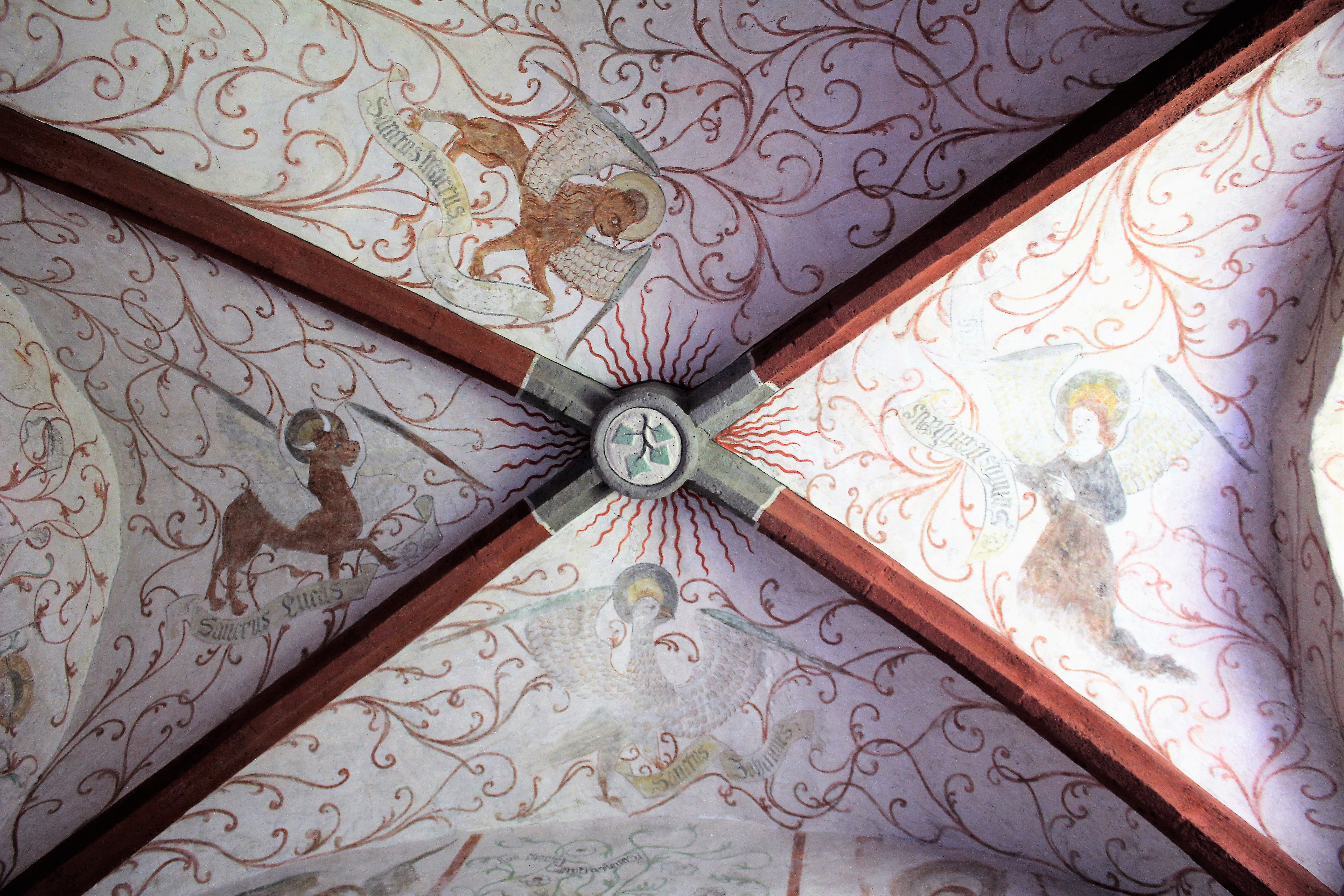 Evangelische Kirche Münster, Laubach, Landkreis Gießen, Hessen, Deutschland